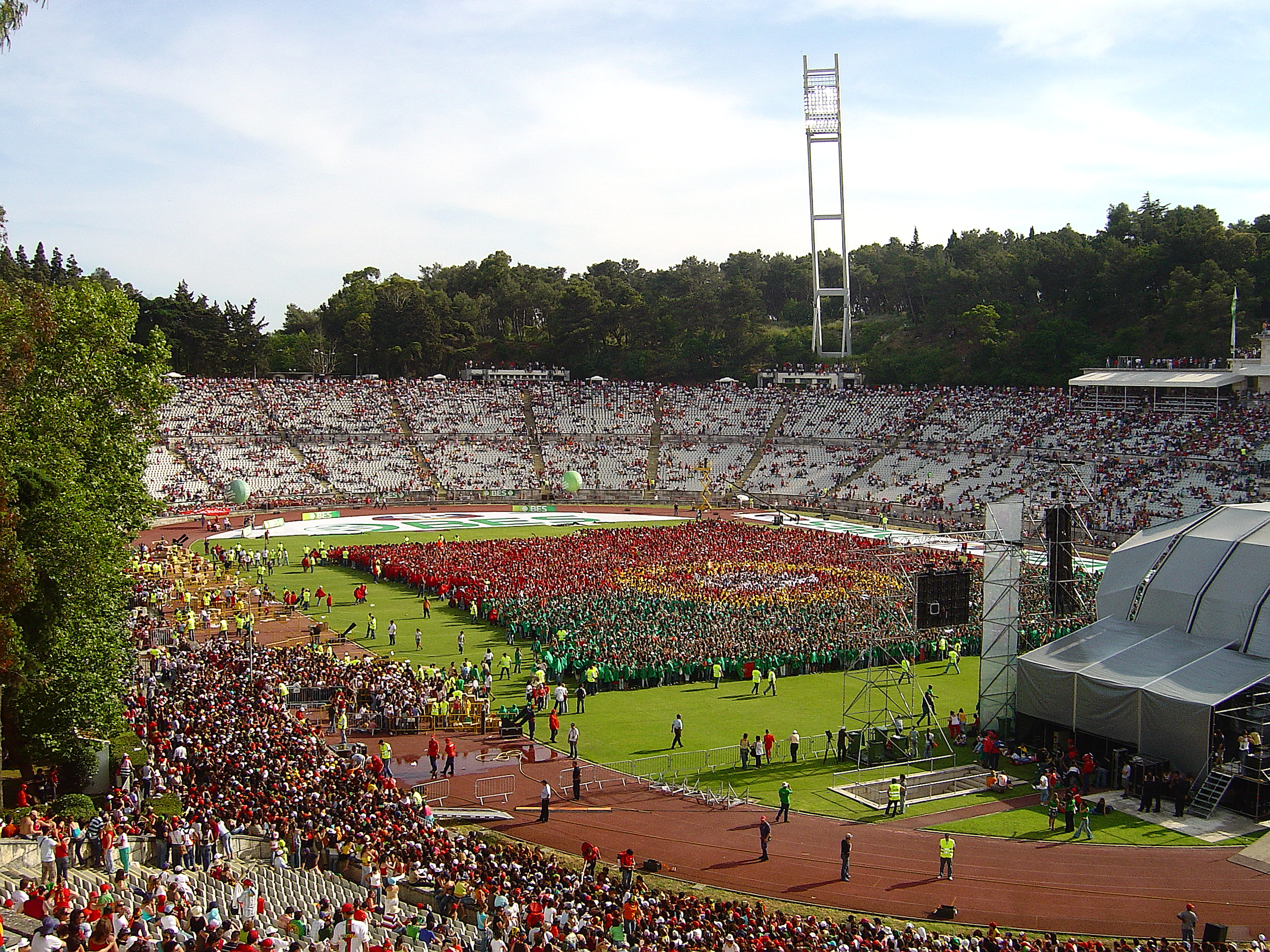 Durante o evento "A mais bela bandeira do mundo" - promoção da participação portuguesa no Mundial de Futebol 2006. See where this picture was taken. [?]